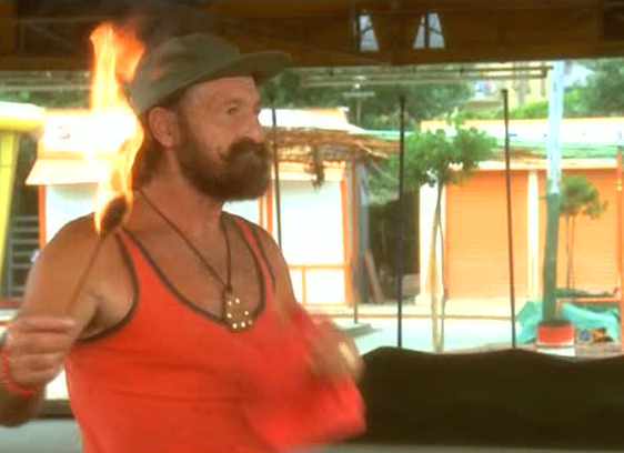 Screenshot dell'attore Osiride Pevarello in una scena del film Colpo in canna diretto da Fernando Di Leo nel 1975